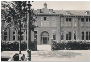 Foto van oude gebouw Goois Lyceum aan de Vossiuslaan 2a te Bussum, Nederland. Architect: Cornelis Kruisweg (1868-1952).